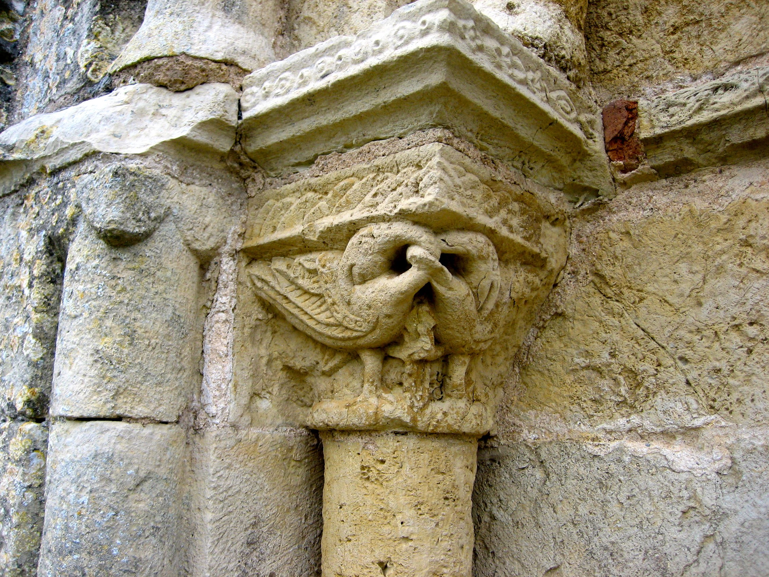 Chapiteaux sur le portail de l'église Saint-Georges de Saint-Jeanvrin